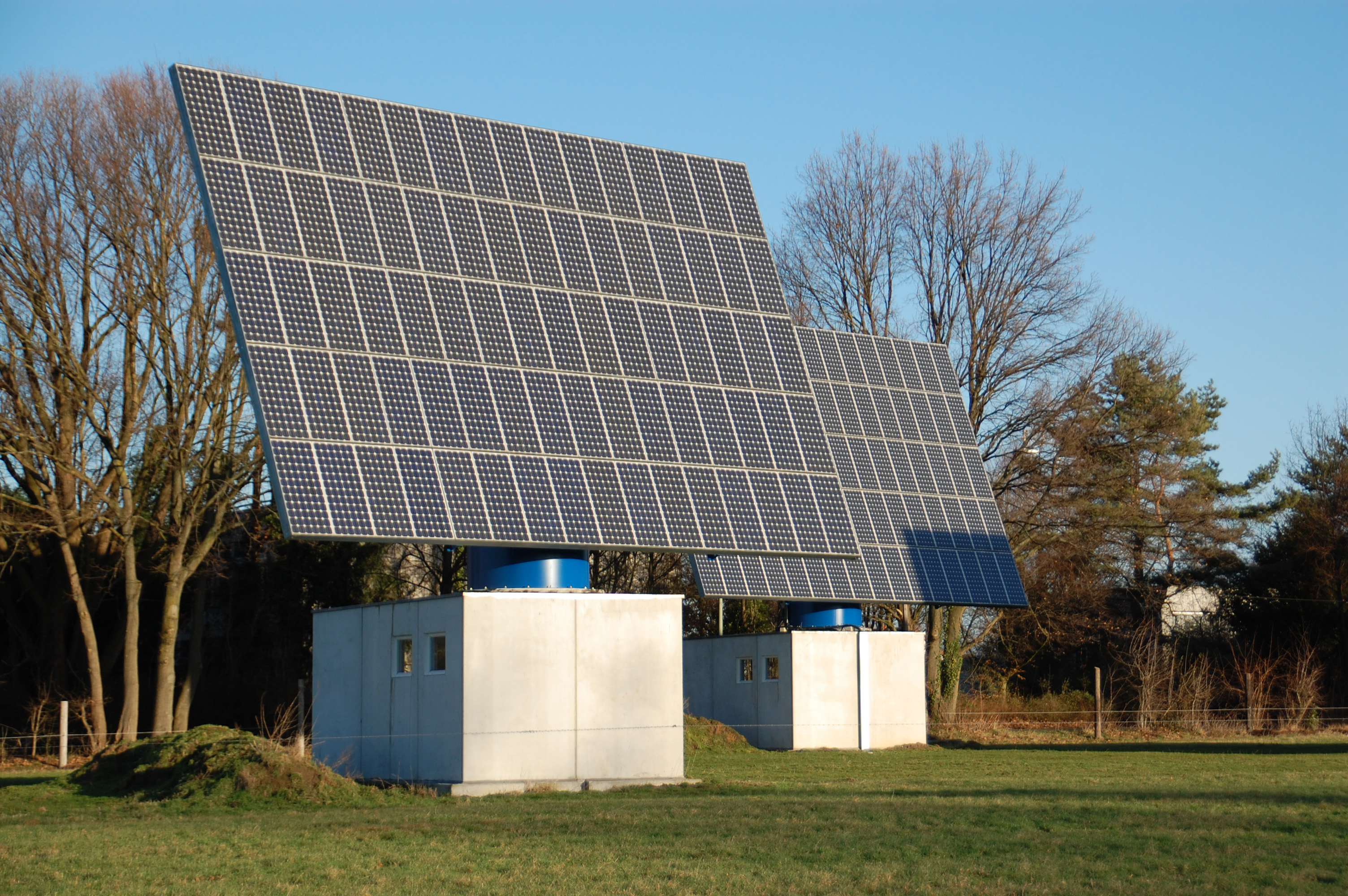 Solaranlage/Photovoltaikanlage Dedinghausen, Lippstadt